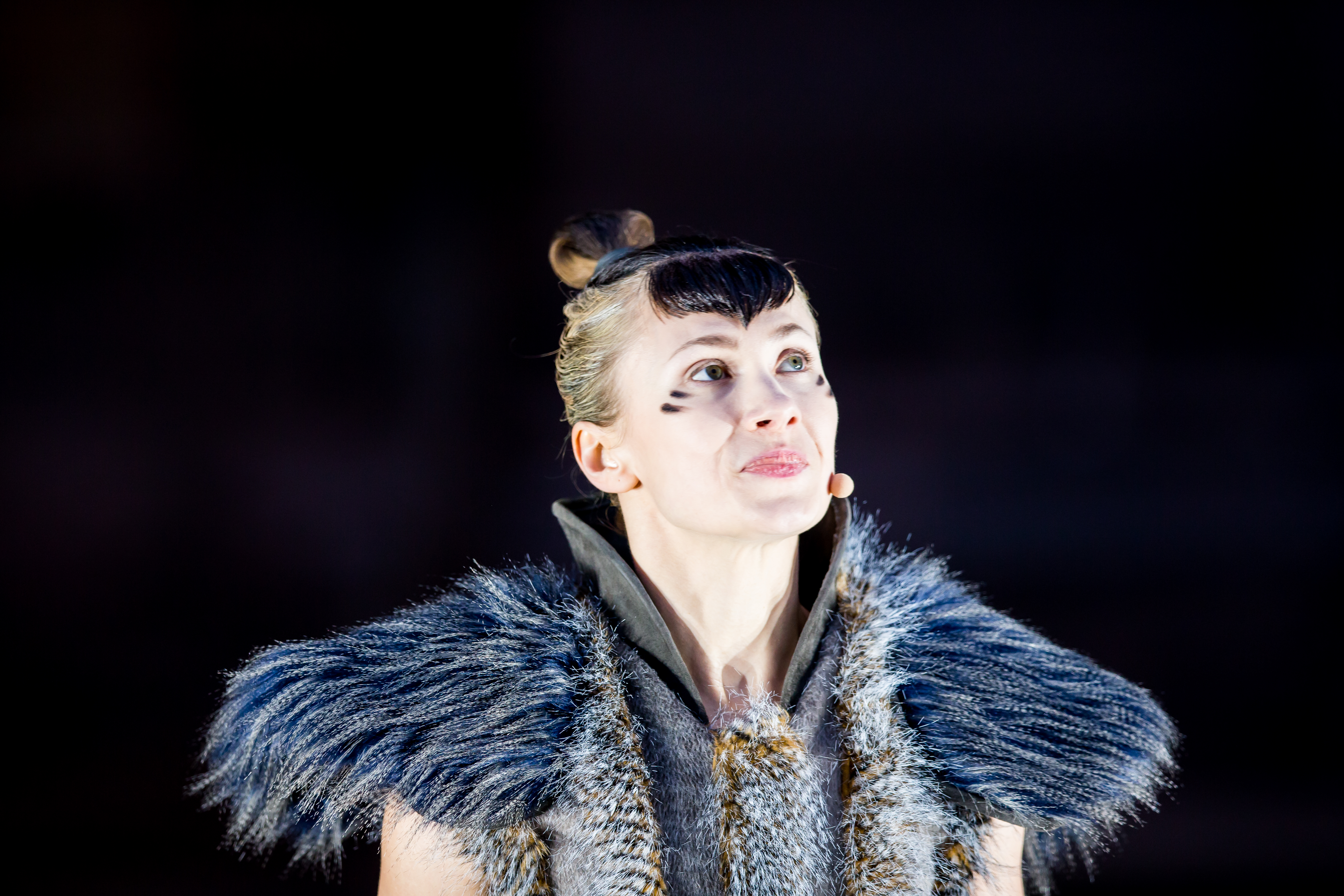 Nibelungenfestspiele Worms Gemetzel 2015 Nordseite Wormser Kaiserdom Nico Hofmann (Intendant), Albert Ostermaier (Autor), Thomas Schadt (Regisseuer) Enemble: Alina Levshin (Ortlieb), Maik Solbach (Narr), Judith Rosmair (Kriemhild), Catrin Striebeck (Brünhild), Markus Boysen (Etzel), Heiko Pinkowski (Dietrich), Max Urlacher (Hagen), Holger Kunkel (Gunter), Gabriel Raab (Gernot), Peter Becker (Giselher), Tom Radisch (Volker), Marion Breckwoldt (Zofe), Radu Cojocariu (Erzähler)